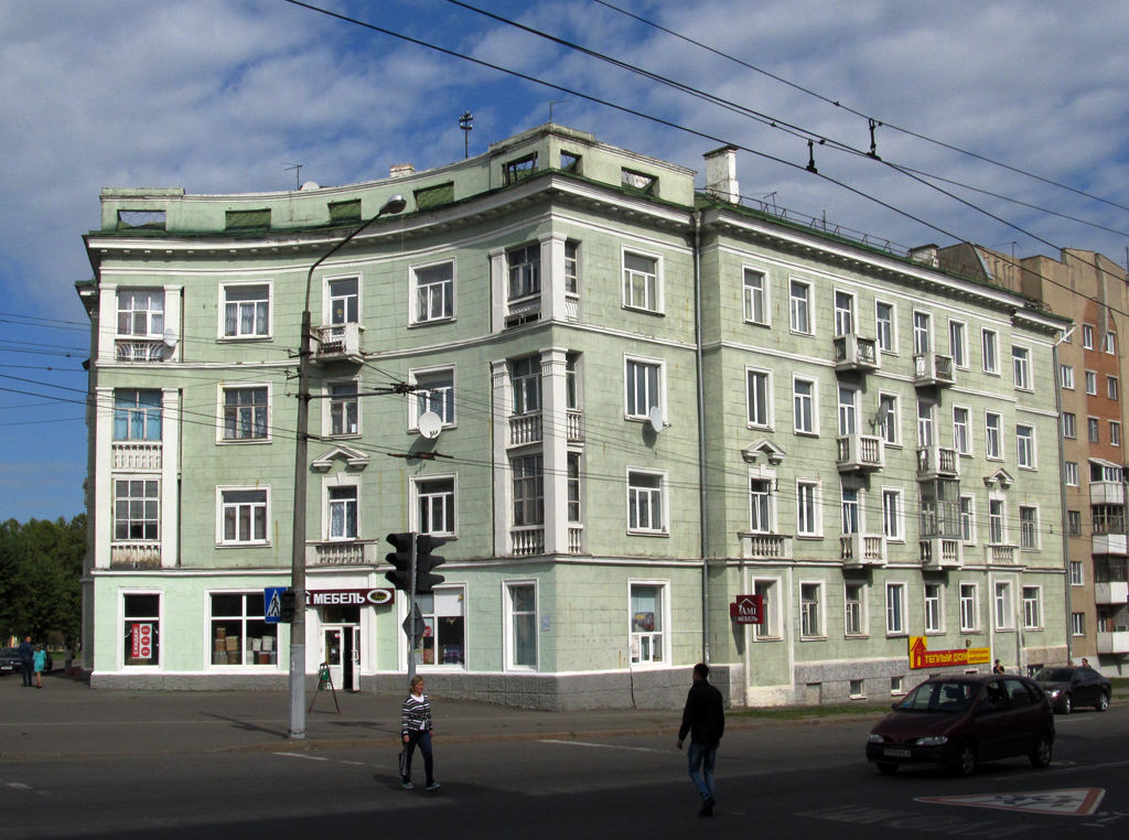 Магілёў. Вуліца Чалюскінцаў, 54